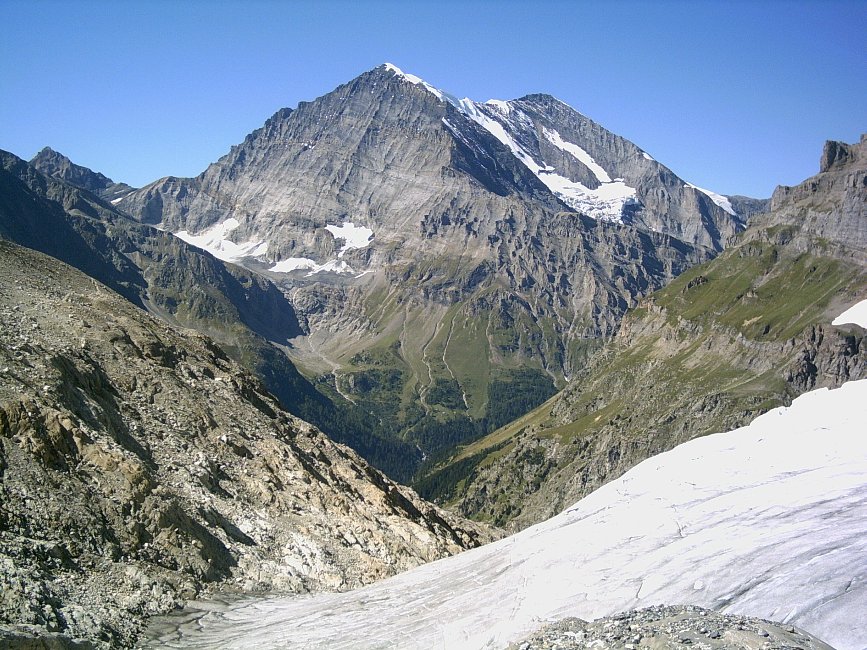 Balmhorn (Mitte) und Altels (rechts), Berner Oberland, Schweiz